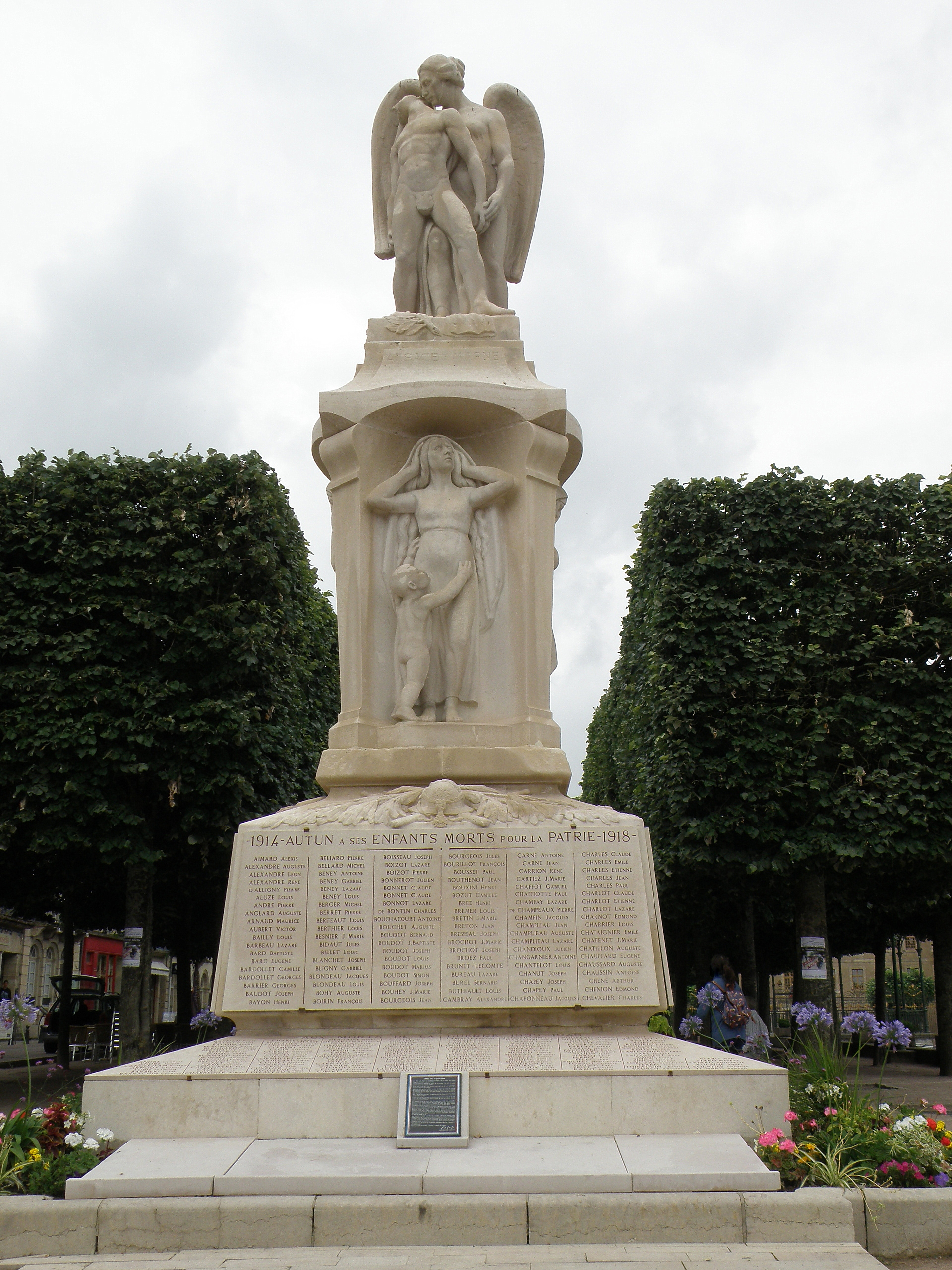 Autun (Saône-et-Loire, Bourgogne, France). Monuments aux morts, place du Champ-de-Mars.